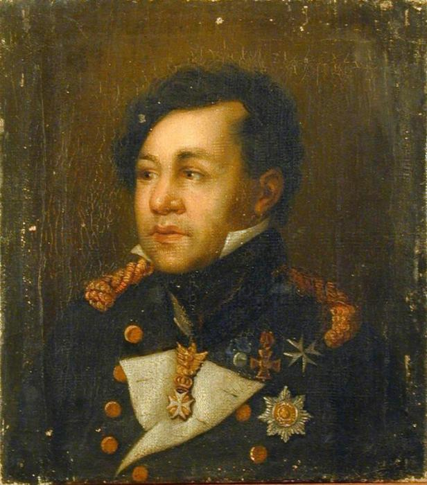 Портрет действительного статского советника Александра Петровича Степанова. Поясной портрет мужчины средних лет в мундире. Изображение: голова в 3/4 влево, корпус в фас. Лицо округлое, черты крупные, нос, губы утолщенные, глаза - небольшие, карие; черные короткие волосы зачесаны на виски. На мужчине черный двубортный мундир с золотыми эполетами и пуговицами, белыми отворотами воротника. Награды: на шее мальтийский крест, справа на груди - нашивная звезда мальтийского креста, крест и звезда ордена Александра Невского. Фон ровный, темно-коричневый.